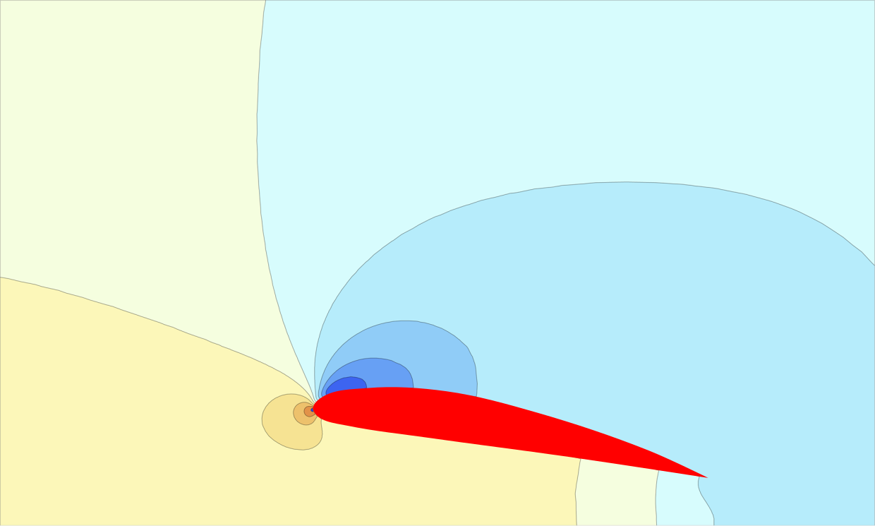 Druckverteilung um einen Flügel in Bodennähe